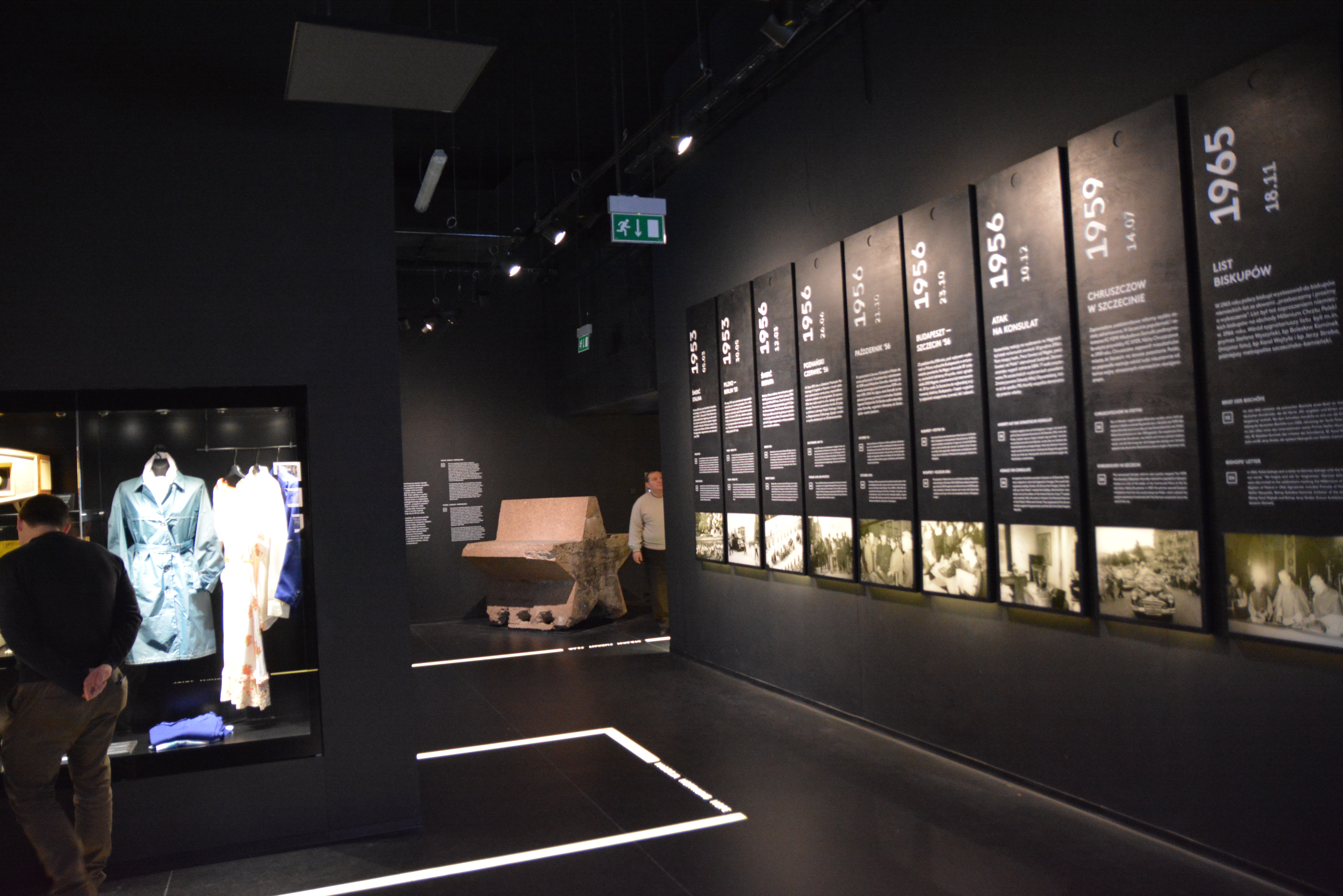 Centrum Dialogu Przełomy - Oddział Muzeum Narodowego w Szczecinie